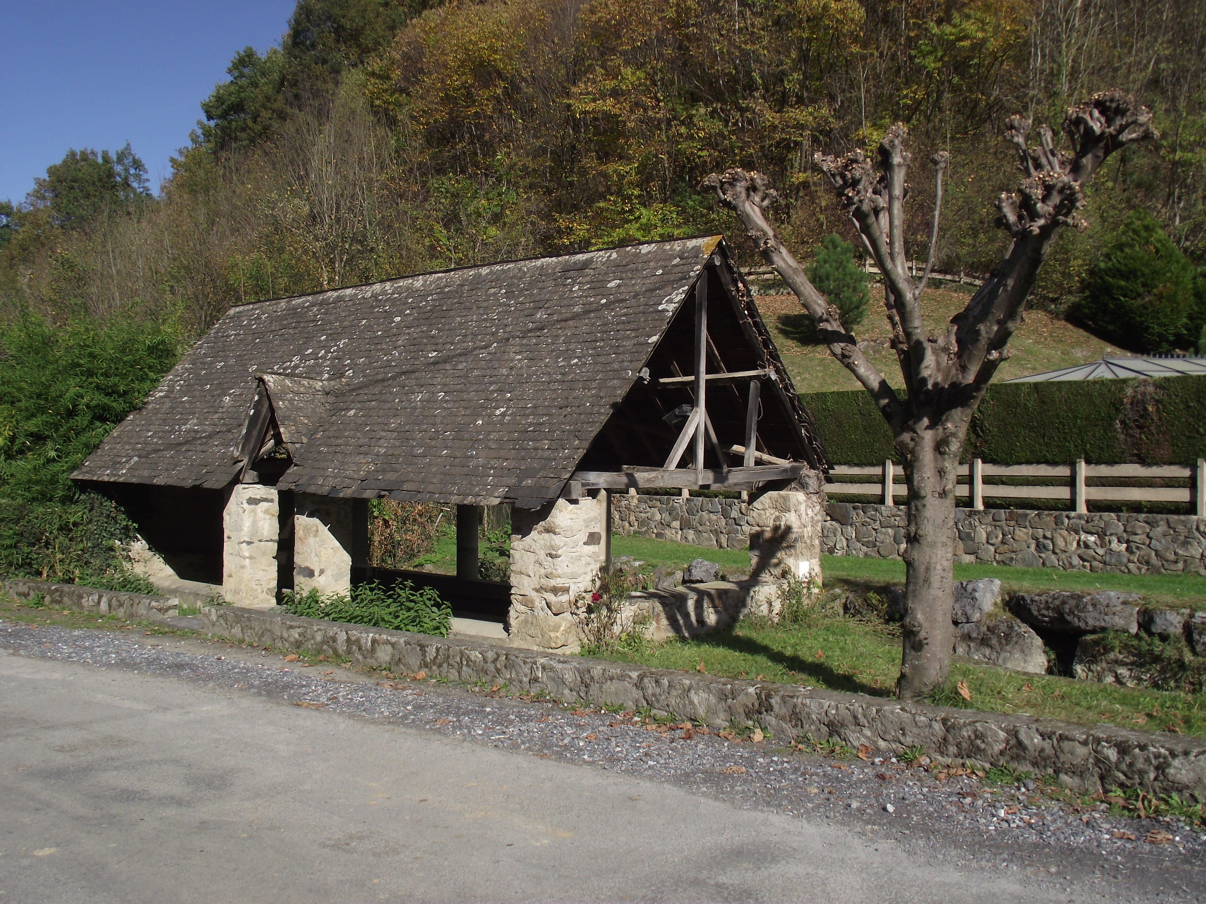 Lavoir des Angles (Hautes-Pyrénées, France)